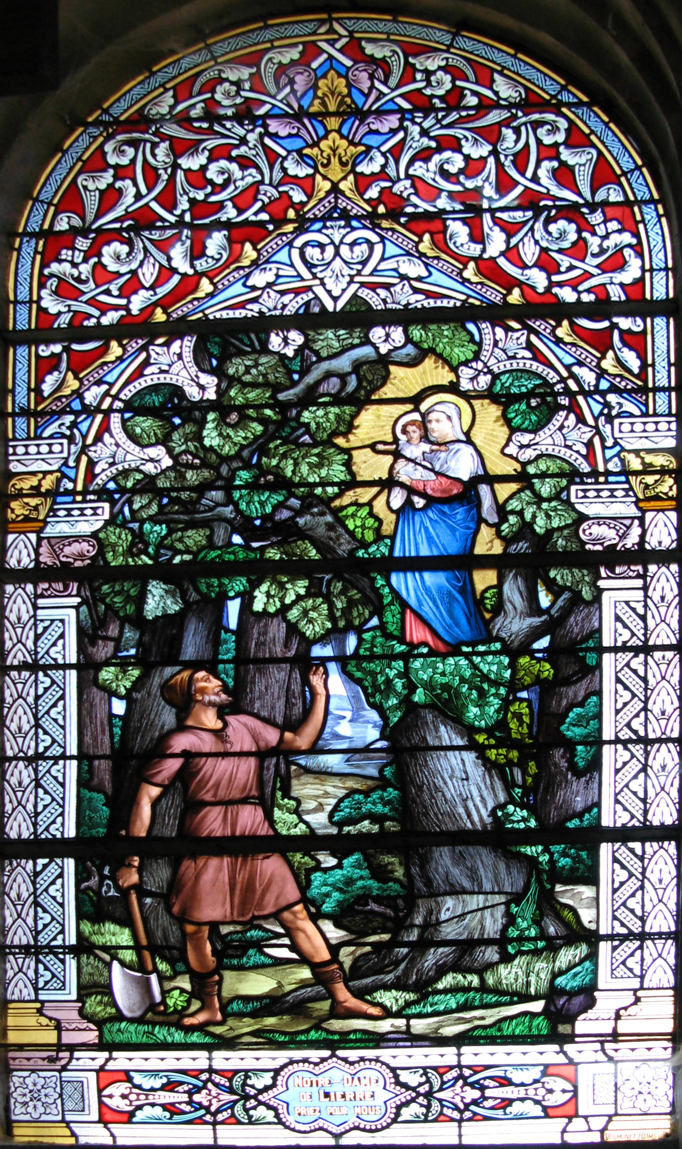 Liart (Ardennes, France) - Église Notre-Dame. Vitrail rappelant la légende de la création du village. .